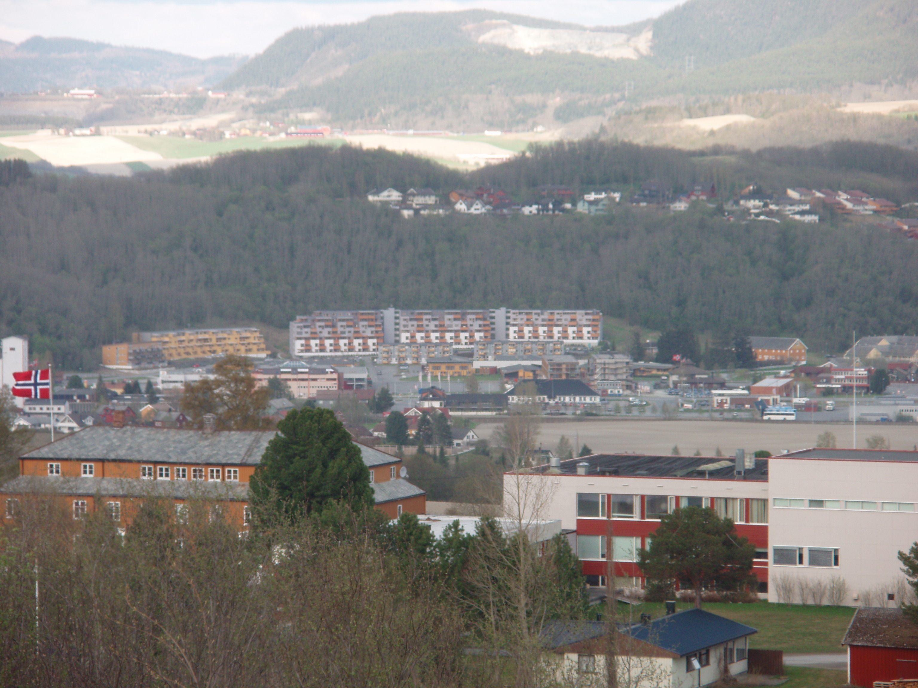 Melhus sentrum, tatt fra Gimse